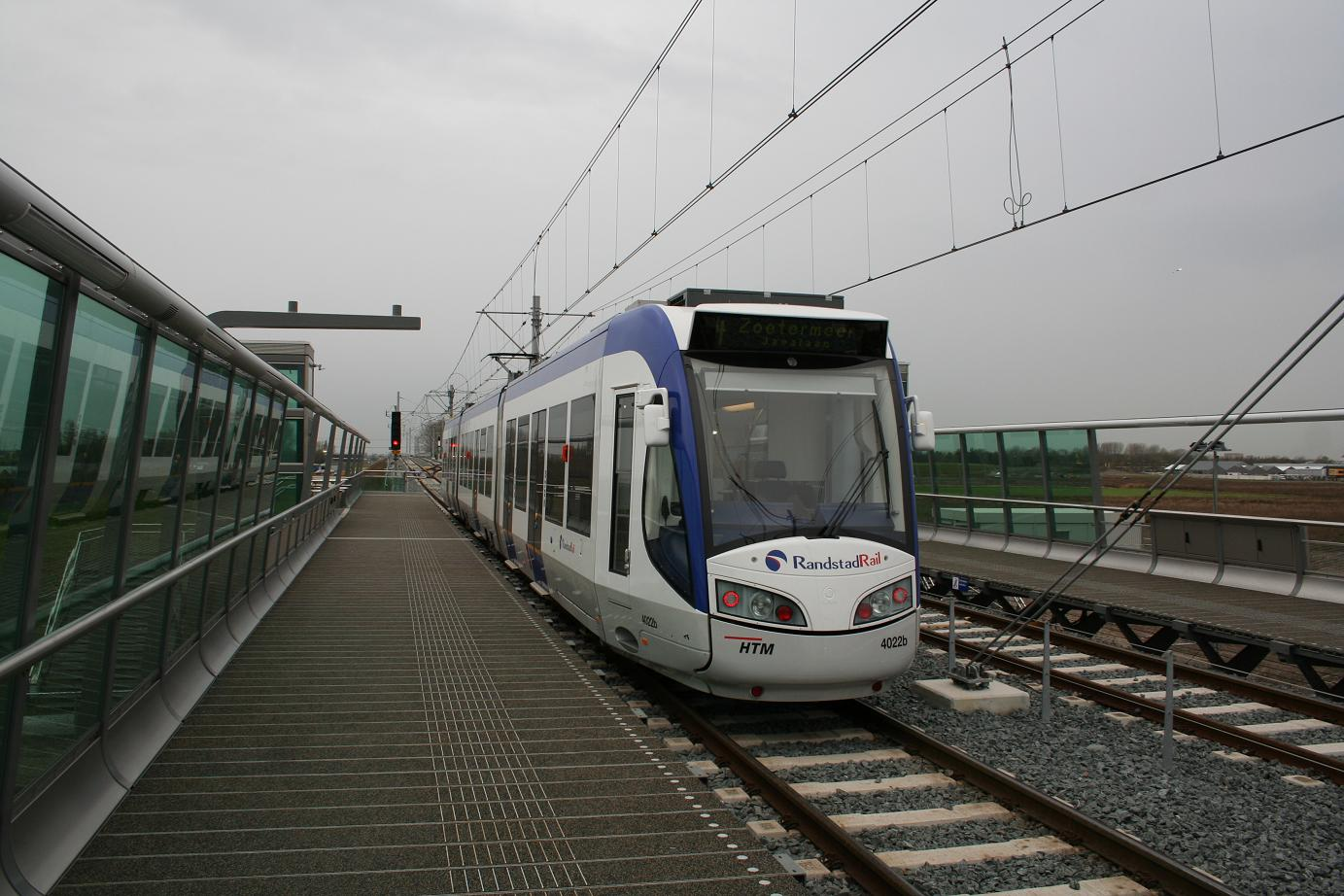 HTM 4022 Zoetermeer Randstadrail, Javalaan